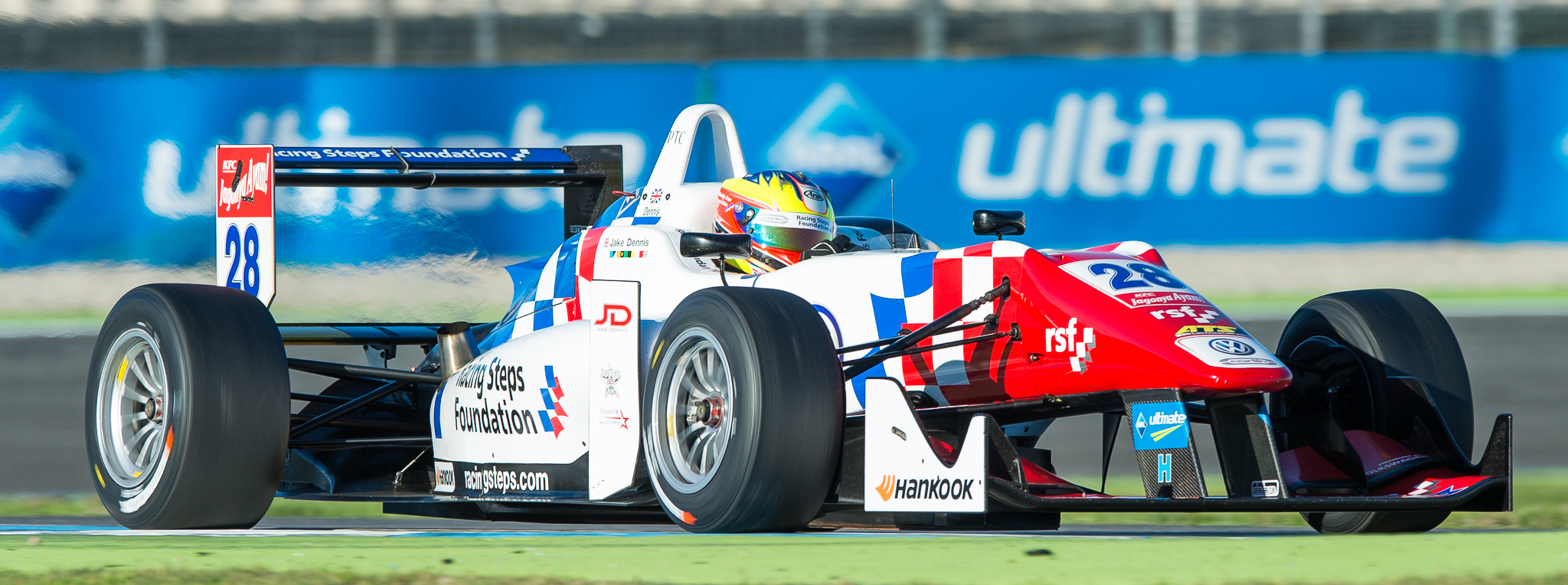 Carlin,DTM,Dallara F312,Deutsche Tourenwagen Masters,F3 FIA European Championship,FIA Formel 3 Europameisterschaft,Hockenheimring,Jake Dennis,Motorsport